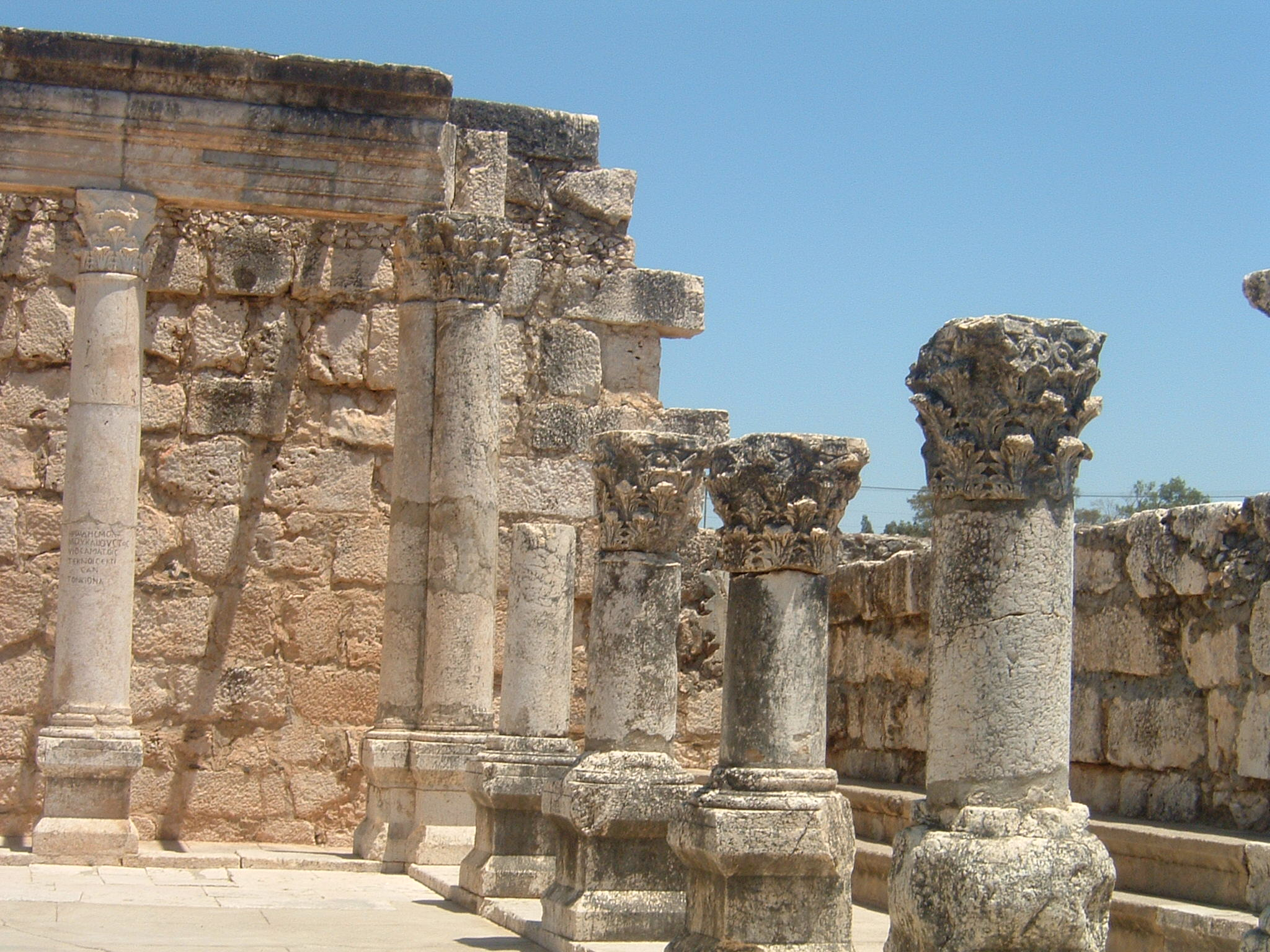 Foto scattata da me il 13 giugno Resti della sinagoga di Cafarnao